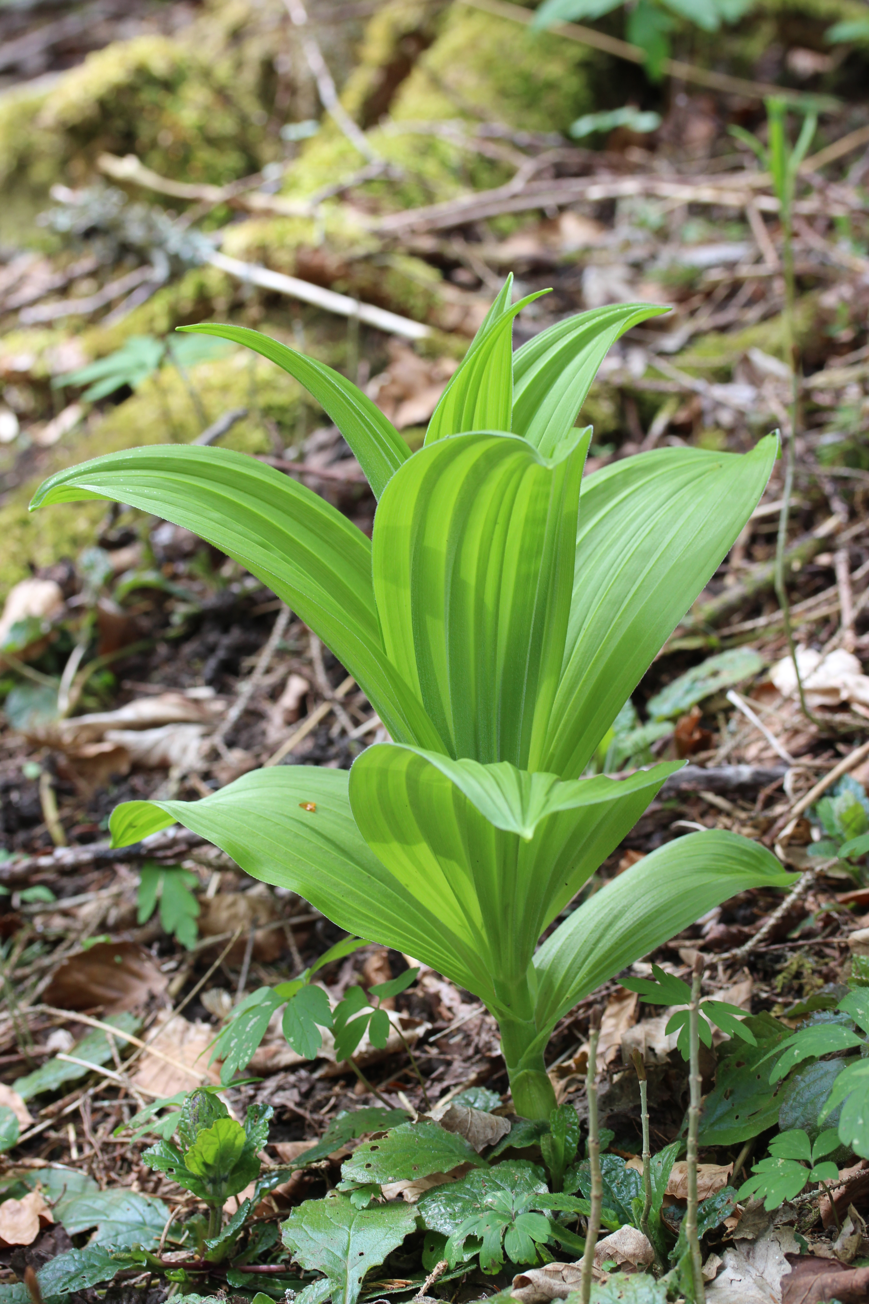 False Helleborine - Veratrum album